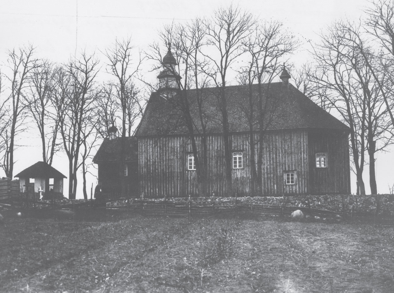 Беларуская (тарашкевіца): Верхняе (Vierchniaje). Царква